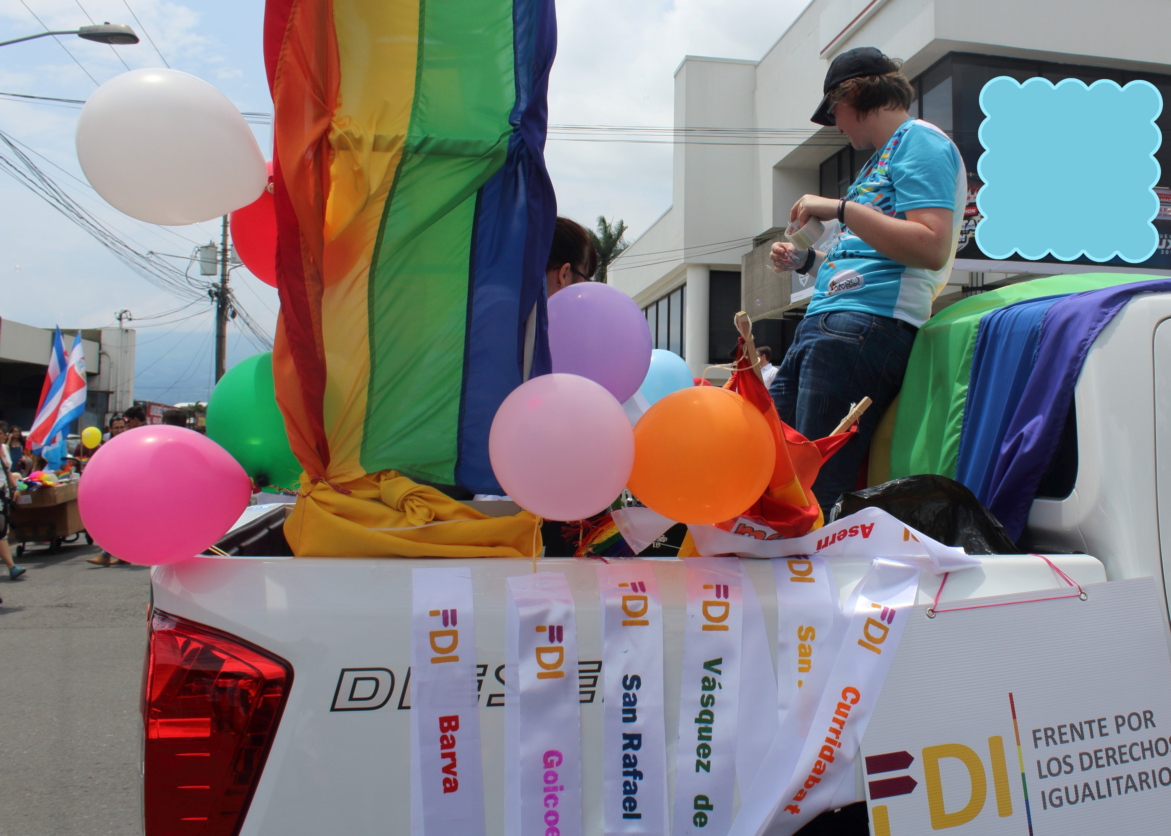 Carroza del Frente por los Derechos Igualitarios durante la Marcha de la Diversidad 2016